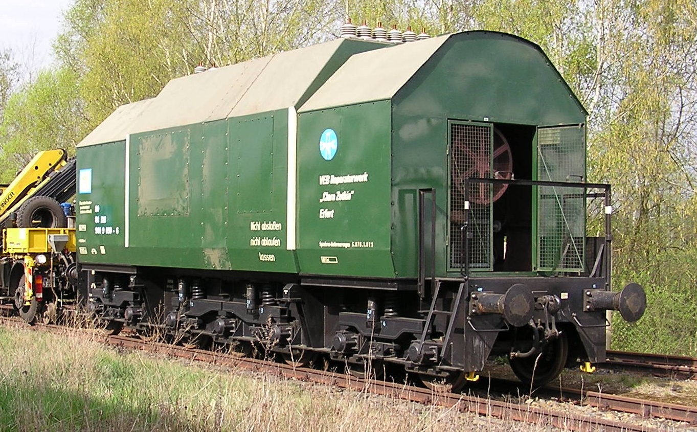 Abtransport eines Umformers der ehemaligen Deutschen Reichsbahn der DDR, VEB Reparaturwerk „Clara Zetkin“ – vgl. Bahnstromumformerwerk und fahrbares Unterwerk